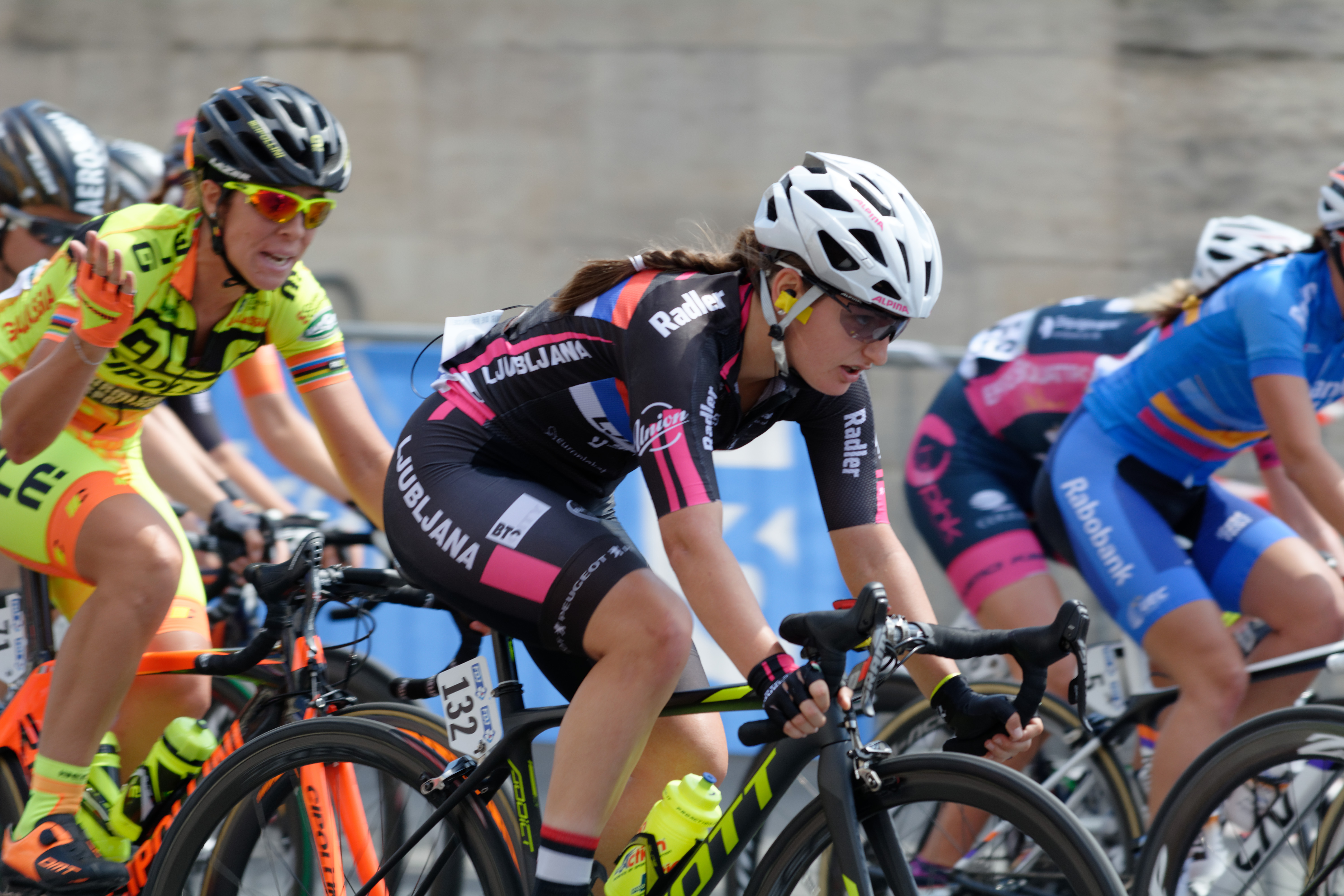 D71_9508_DxO